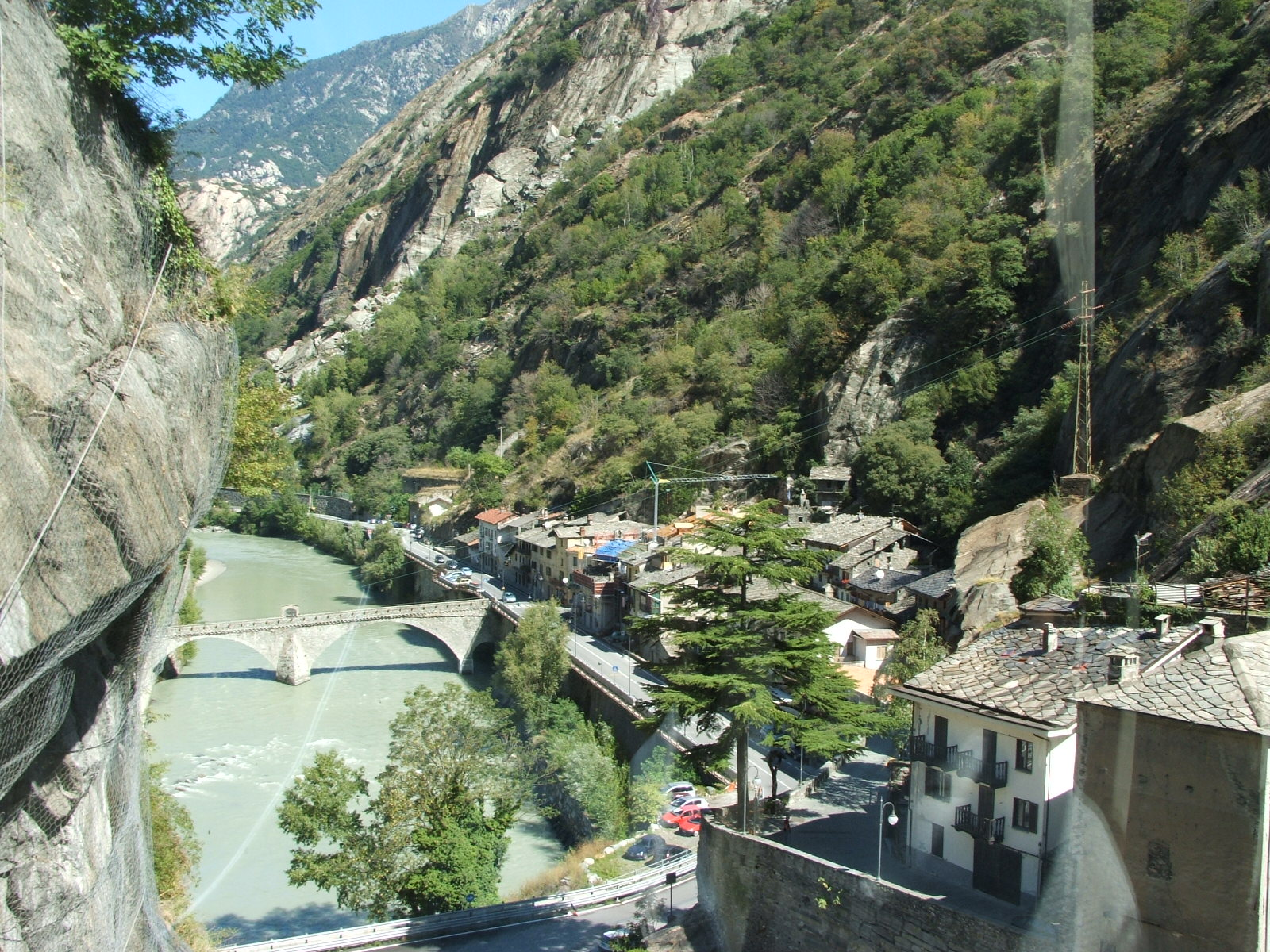 Vall'Aosta - Forte di Bard e Museo delle Alpi